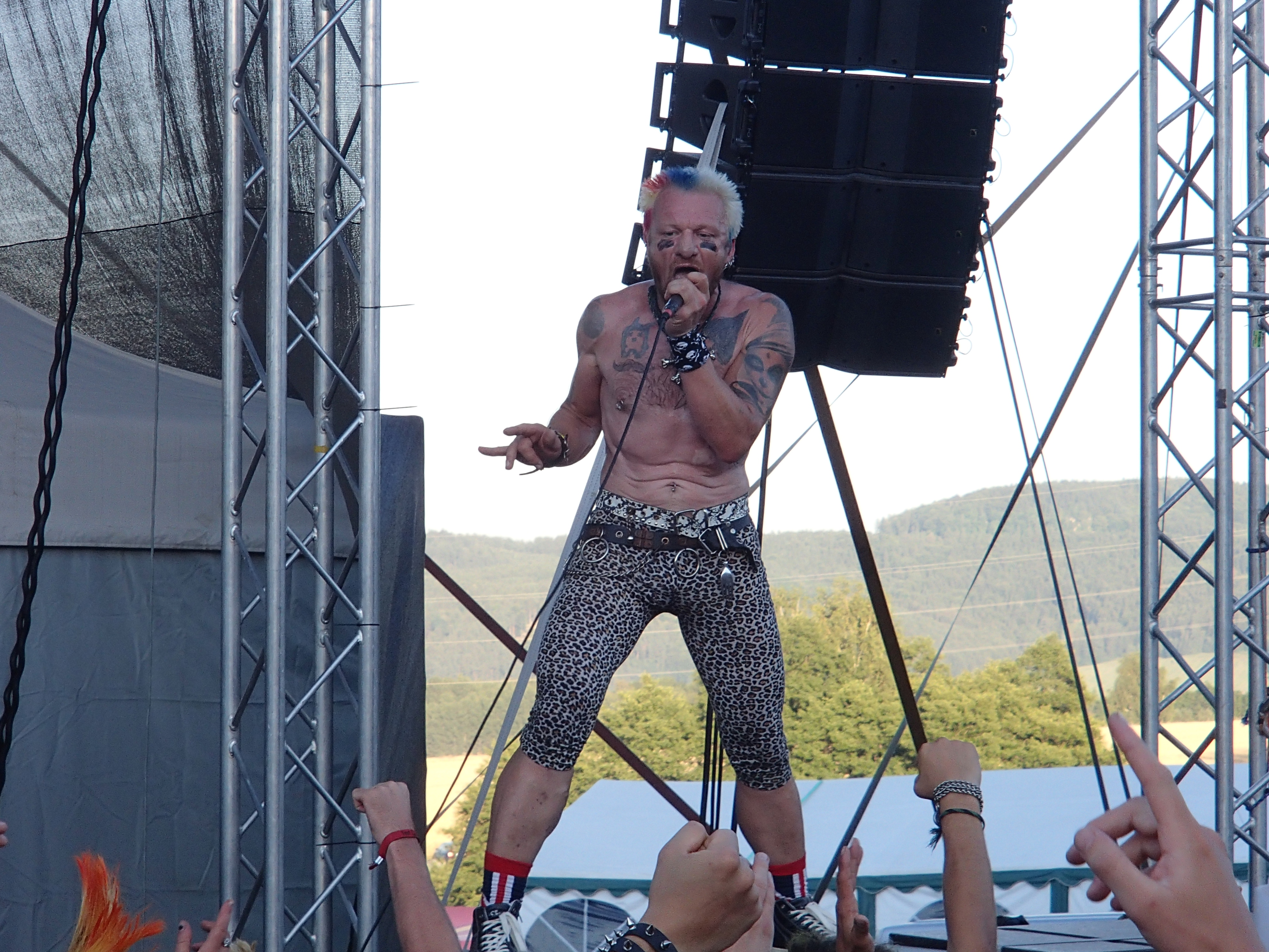 Štěpán "Makeba" Málek, zpěvák N. V. Ú., na festivalu Pod Parou v roce 2013